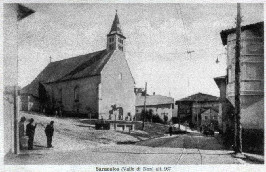 La Chiesa di Santa Maria e la piazza del paese di Sarnonico, negli anni 1920